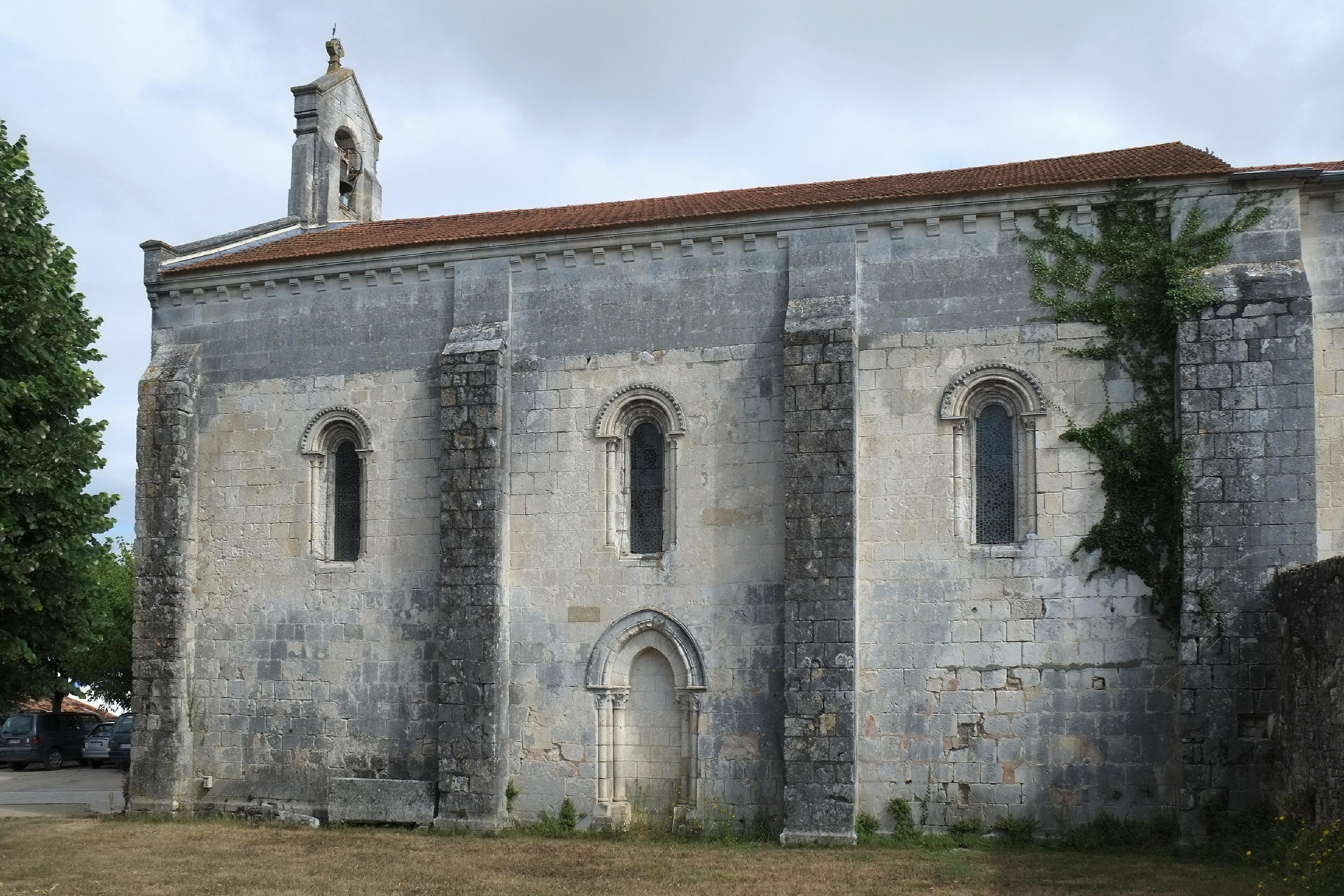 Église Saint-Julien, Saint-Julien-de-l'Escap Charente-Maritime France .